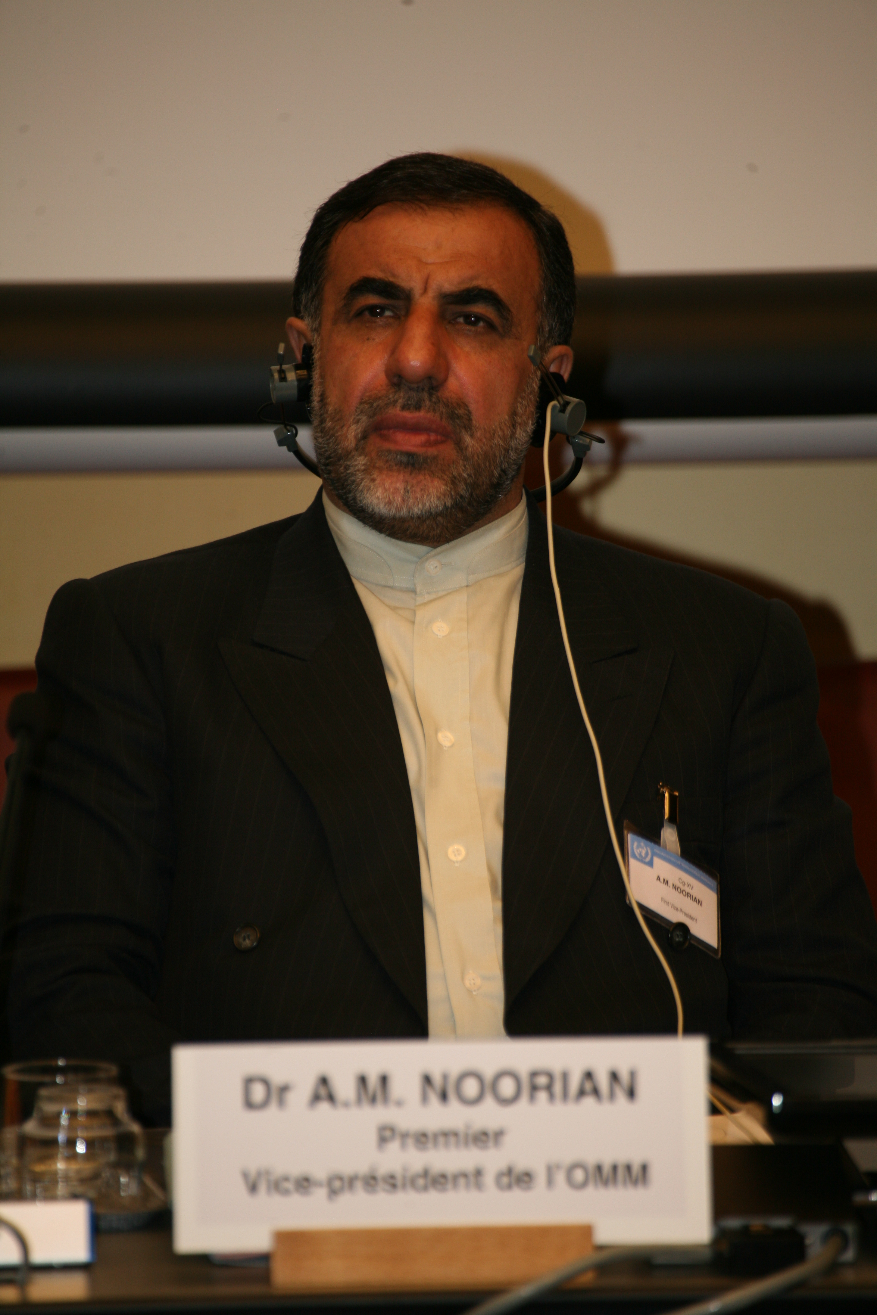 سازمان جهانی هواشناسی،معاون اول